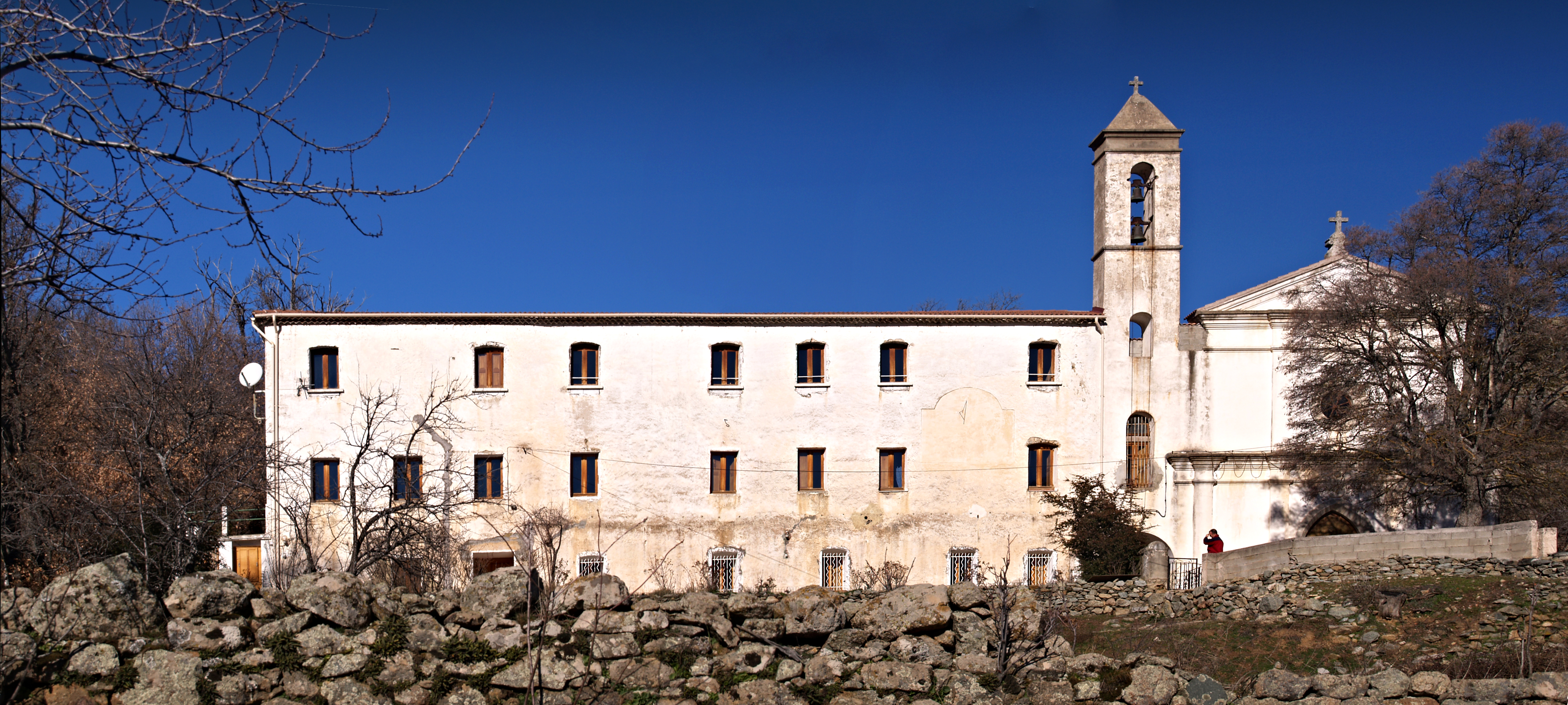 Calacuccia (Corse) - Couvent Saint-FrançoisCorsu: Calacuccia (Corsica) - Cunventu San Francescu